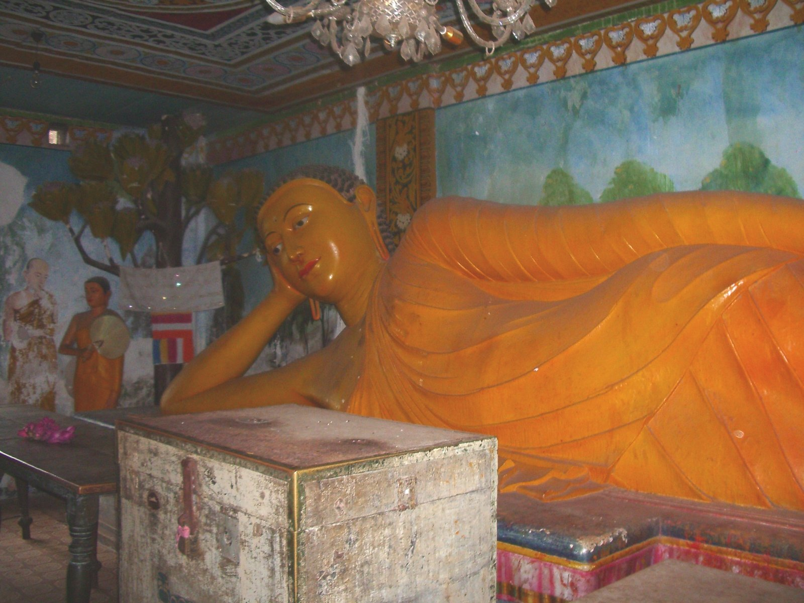 Buda tumbat del temple de Mihintale, foto feta per J. Ollé el juliol del 2006